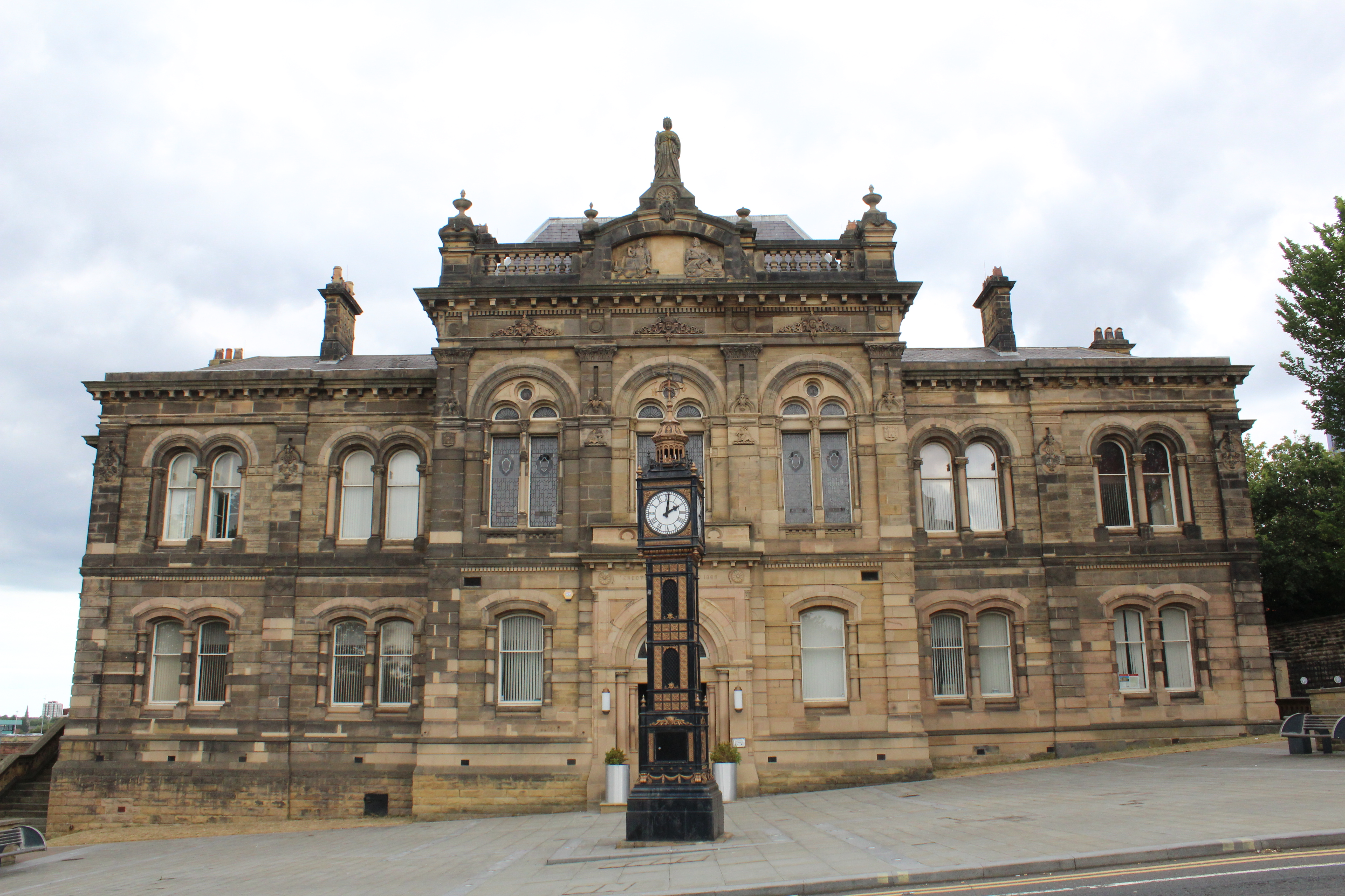 Ancien hôtel de ville de Gateshead.